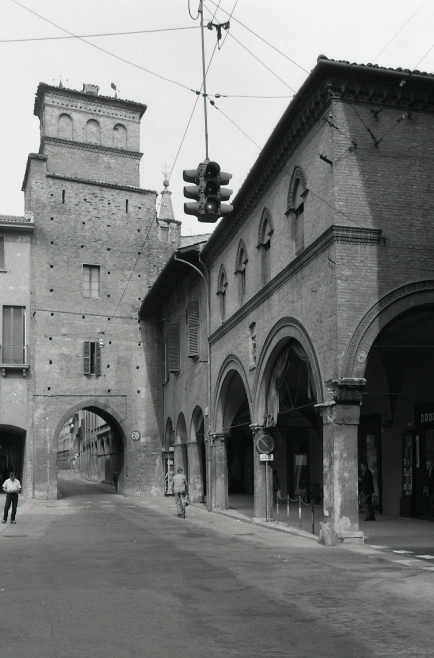 Servizio fotografico : Bologna, 1969 / Paolo Monti. - Strisce: 7, Fotogrammi complessivi: 37 : Negativo b/n, gelatina bromuro d'argento/ pellicola ; 35 mm. - ((I fotogrammi hanno una doppia numerazione. . - Sul portanegativi: Nikon Agfa 21. - Occasione: Campagna di rilevamento del centro storico del comune di Bologna. - Fonte: Fattura di Paolo Monti: IV. Commesse/ Fattura (1969/05/09), presso Archivio Paolo Monti. - Fonte: Fattura di Paolo Monti: IV. Commesse/ Fattura (1969/07/31), presso Archivio Paolo Monti. - Fonte: Agenda di Paolo Monti: Monti - Agenda 1969 (1969), presso Archivio Paolo Monti